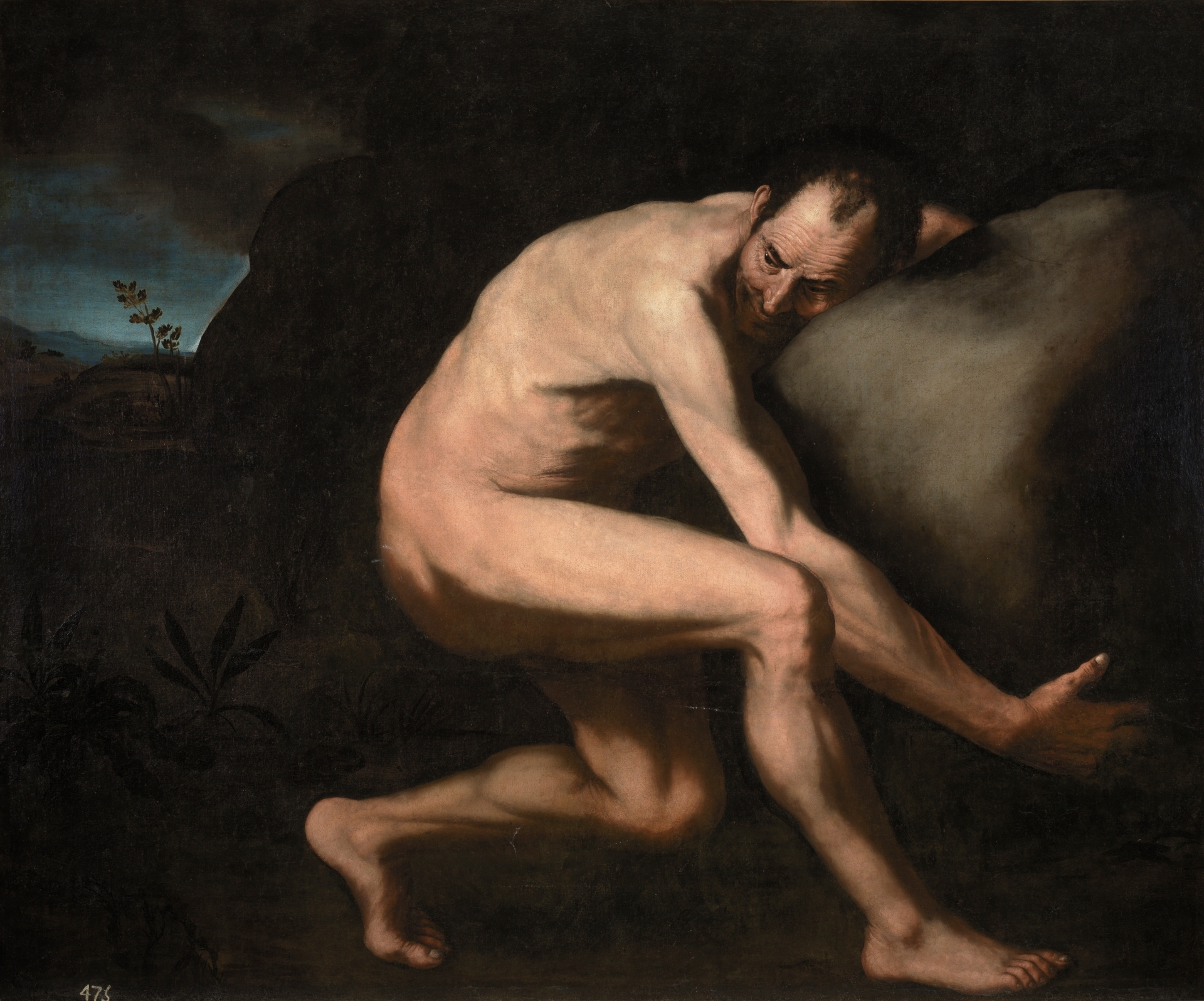 La obra representa a Sísifo, rey de Éfira y condenado por Zeus a hacer rodar con su cabeza y empujando una gran roca cuesta arriba, que continuamente se precipitaba hacia abajo, por haber revelado que Zeus había secuestrado a Egina.